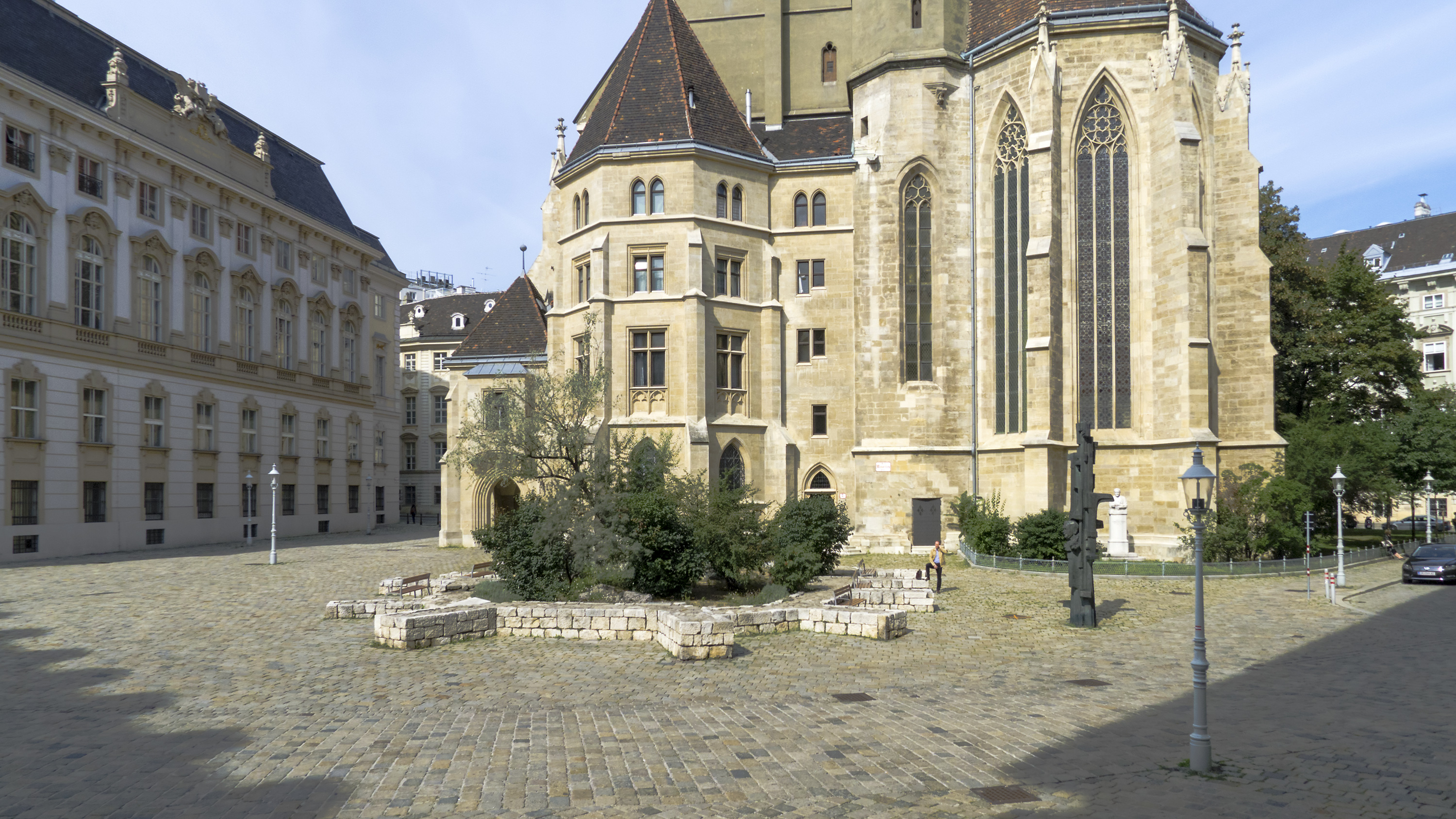 Minoritenplatz in Wien 1 Richtung Westen